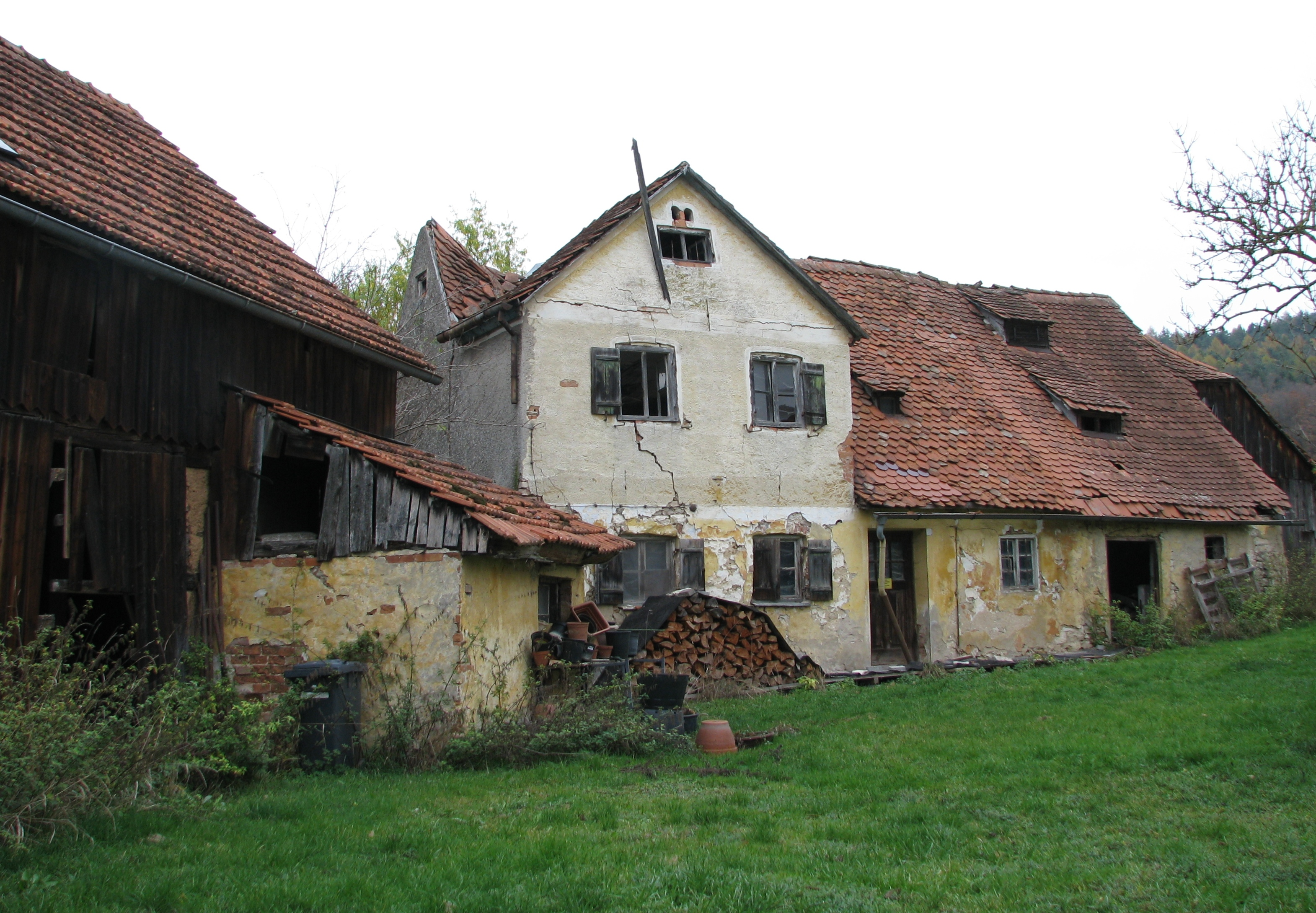 Körnersdorf, Ortsteil von Mühlhausen im Landkreis Neumarkt in der Oberpfalz, altes Bauernhaus